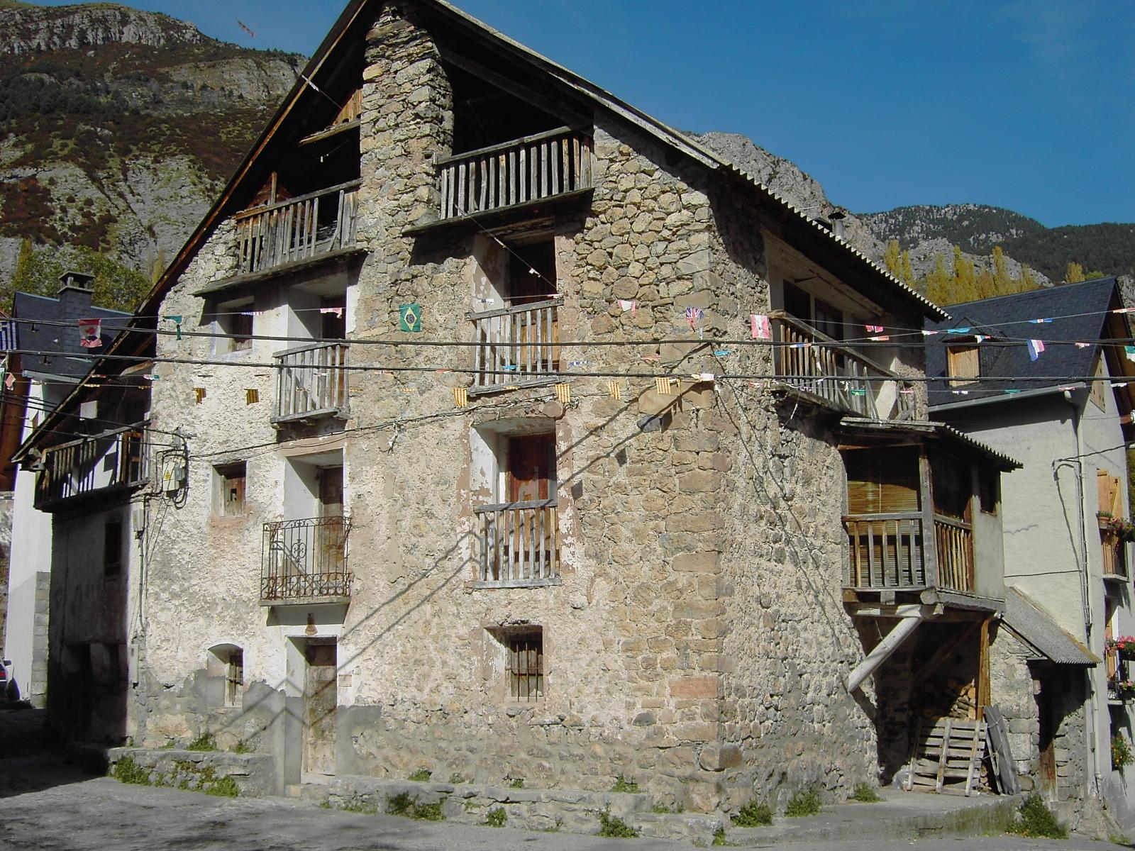 Una casa tradicional en Sin (La Comuna, Huesca), en la plaza de la localidad, que muestra perfectamente algunos de los rasgos característicos de la arquitectura vernácula del valle de La Comuna.